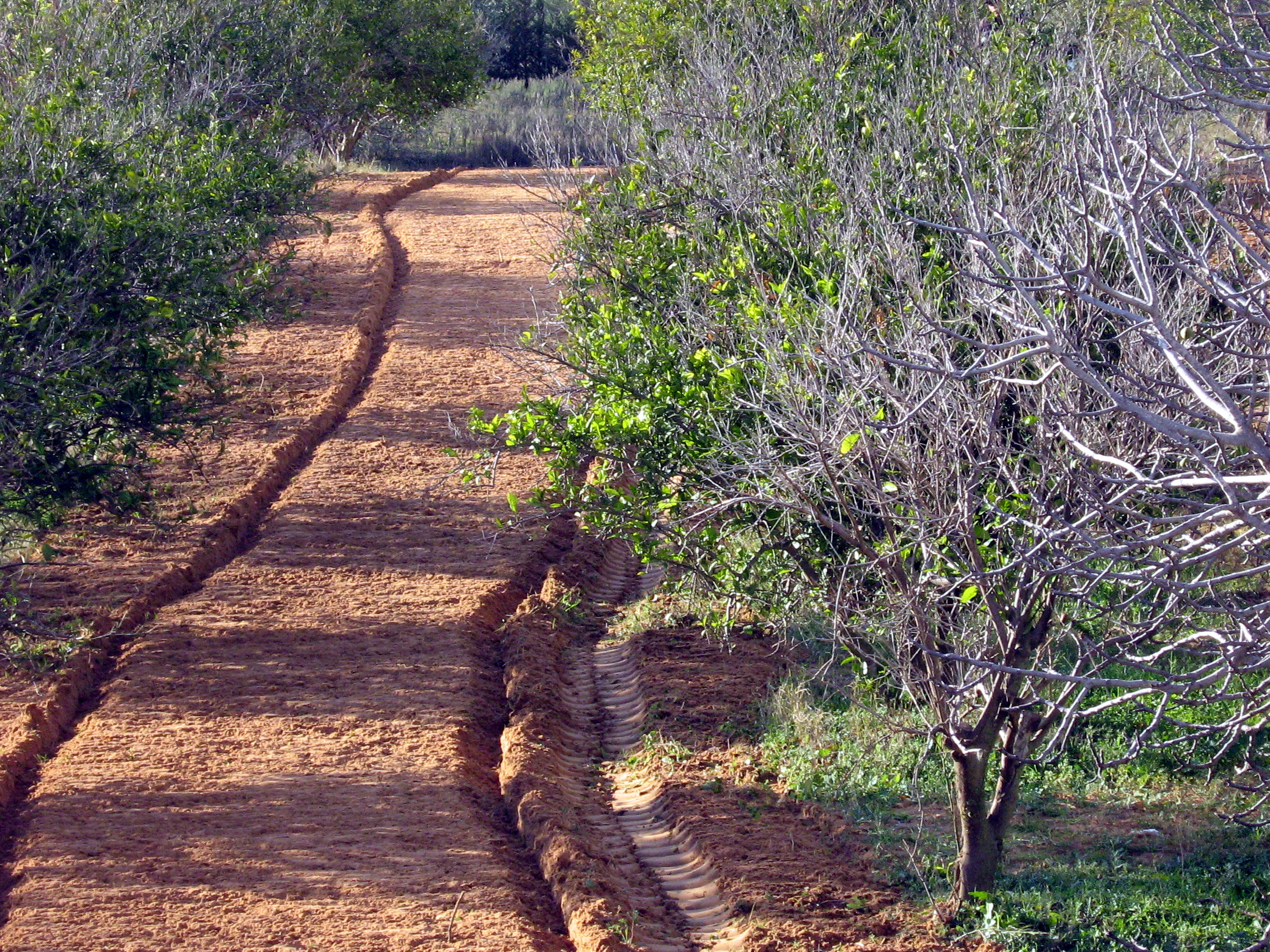 Апельсиновый сад в январе. Бенгашир. Ливия.